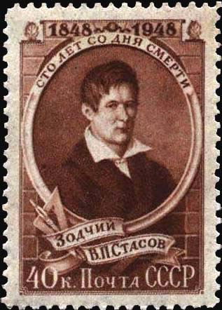 Портрет В. П. Стасова по картине А. Варнека. Почтовая марка СССР 1948г.